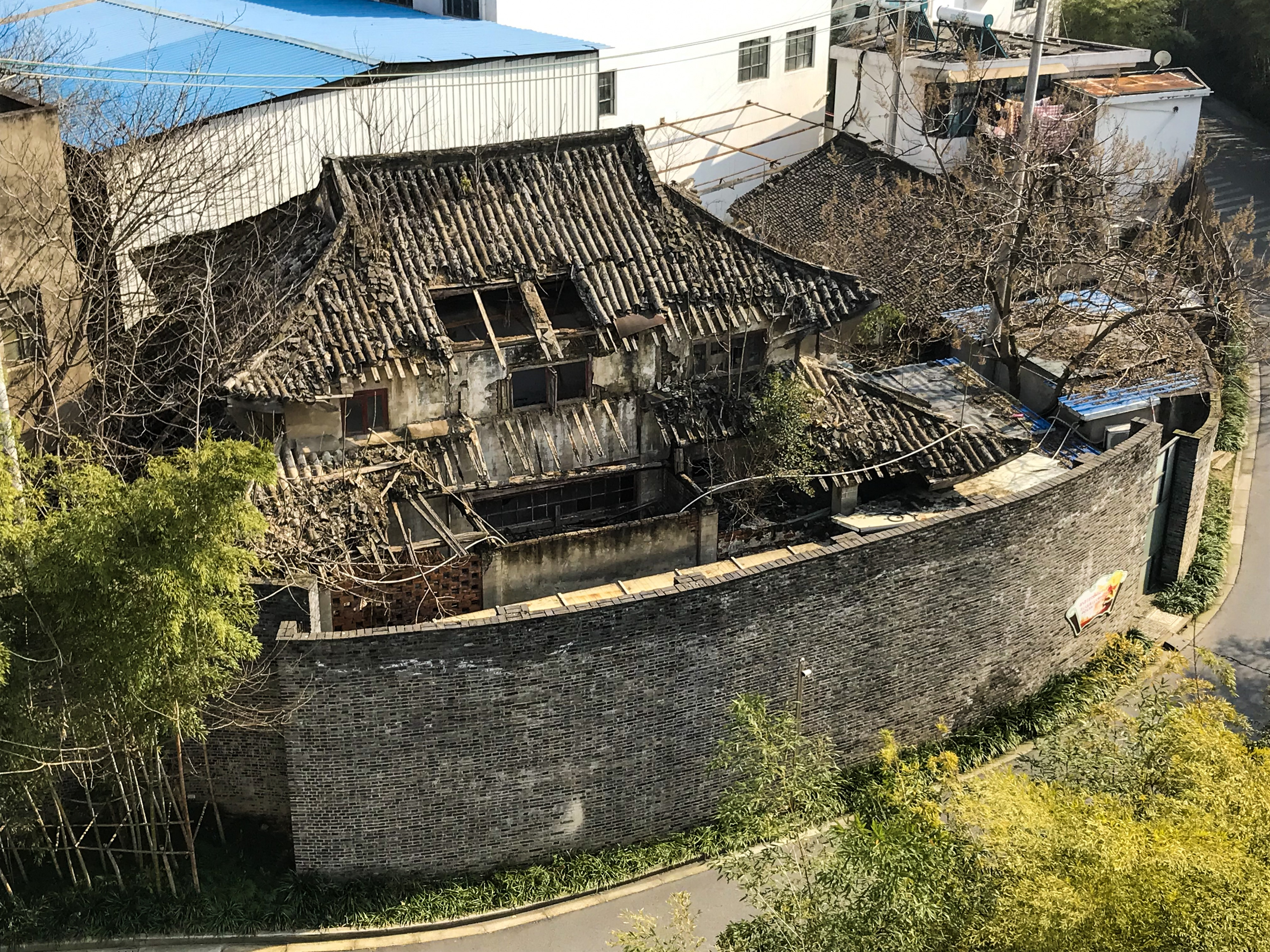 中文（中国大陆）: 联义山庄遗址 彭江路600号上海彭江机械厂内